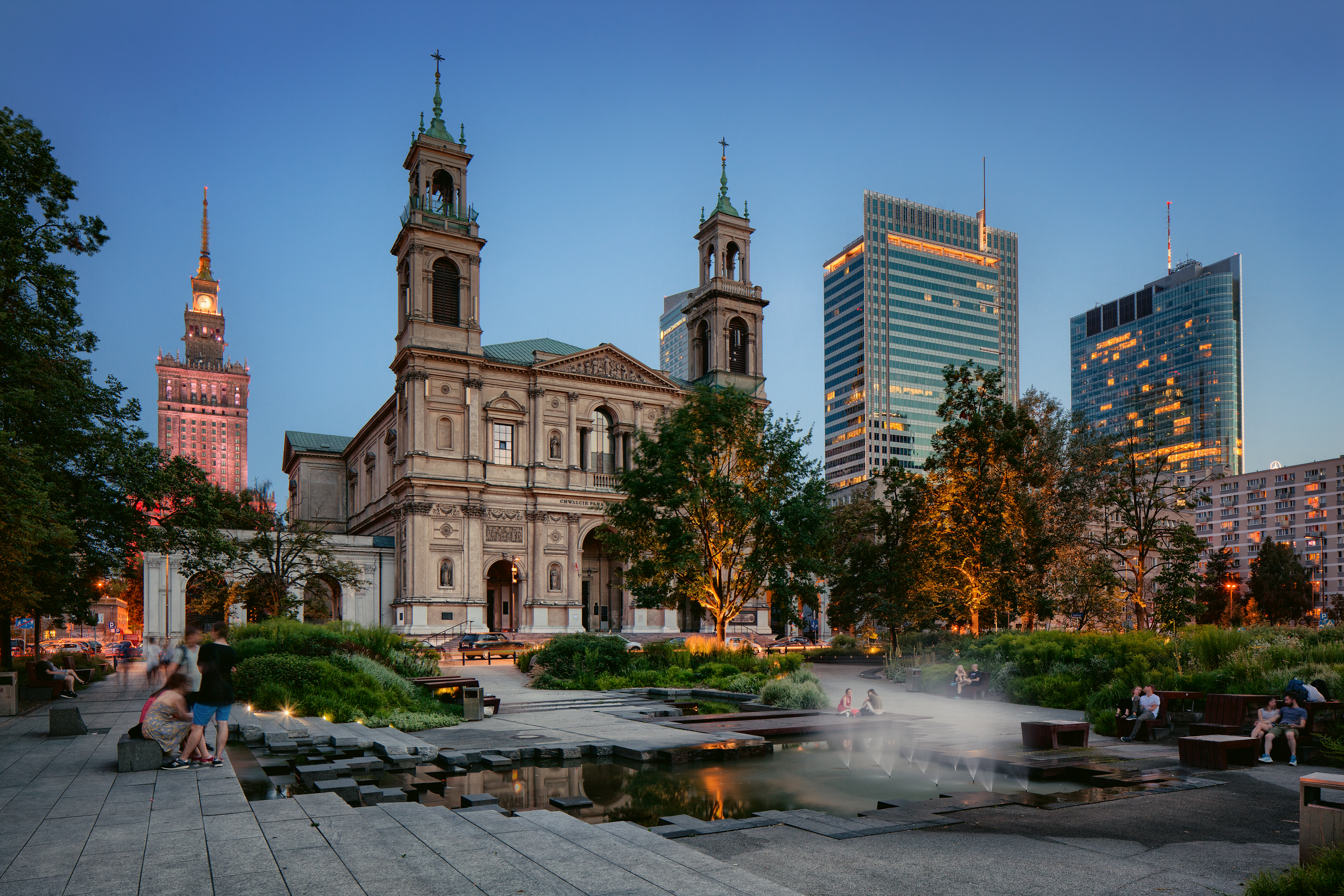 Śródmieście, Plac Grzybowski - założenie urbanistyczne Wikidata has entry Q33535646 with data related to this item.